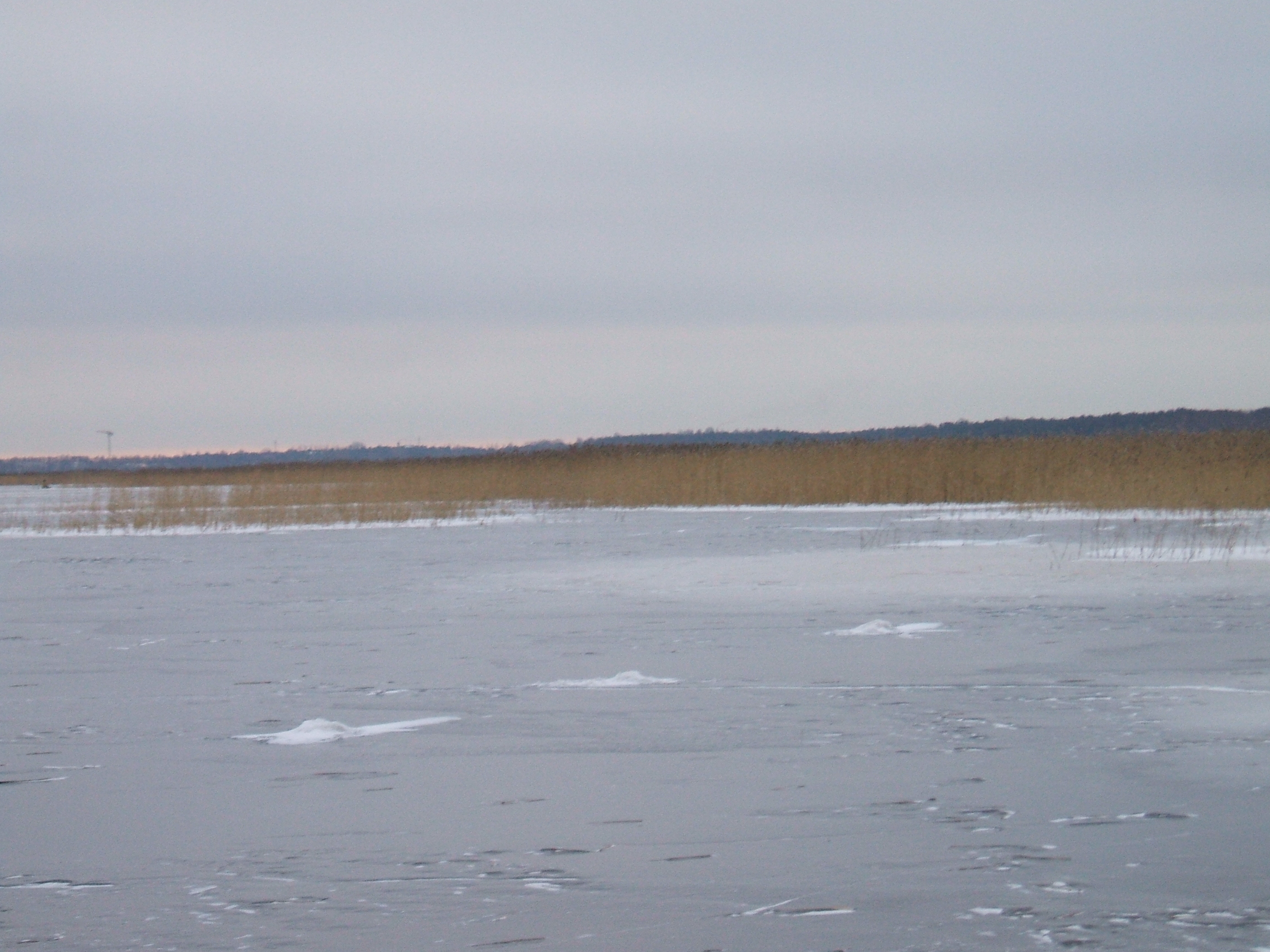 Тростник на Сестрорецком Разливе